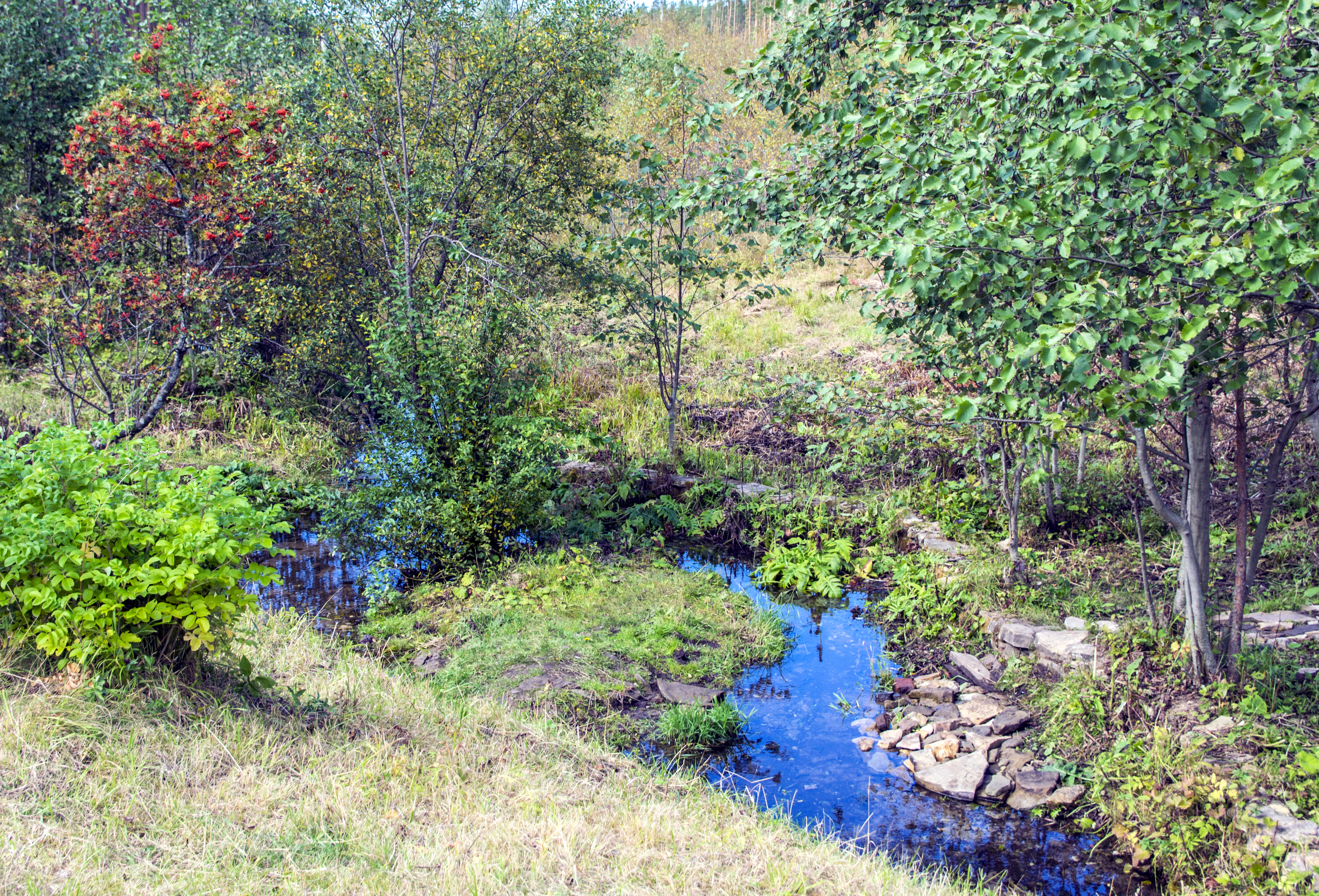 Родник Царский ключ: В 0,5 км от п. Лесохимиков, 267 кв. Суводского лесничества Суводского лесхозтехникума, Советский район, Кировская область This image is related to the protected area of Russia number 4310244